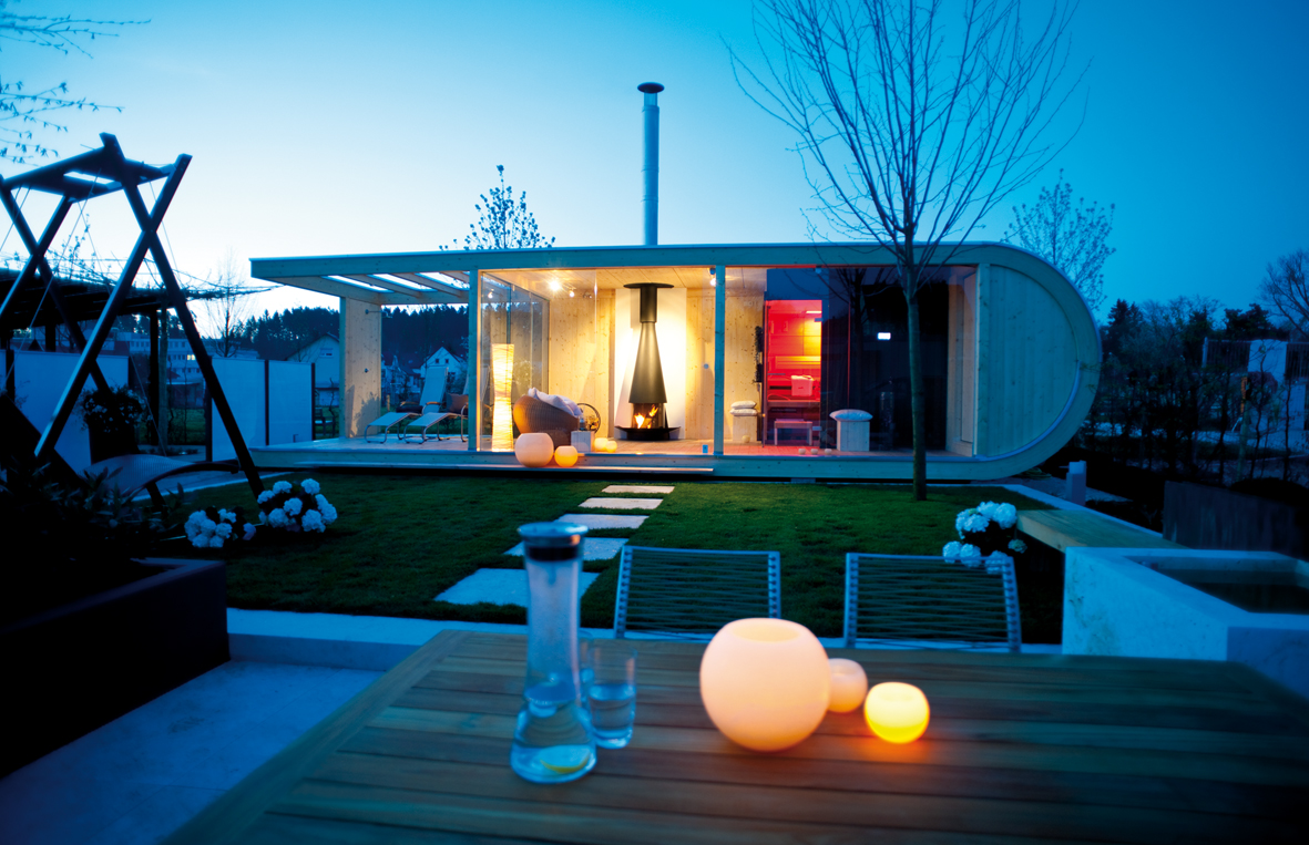 Ettwein Gartenlounge